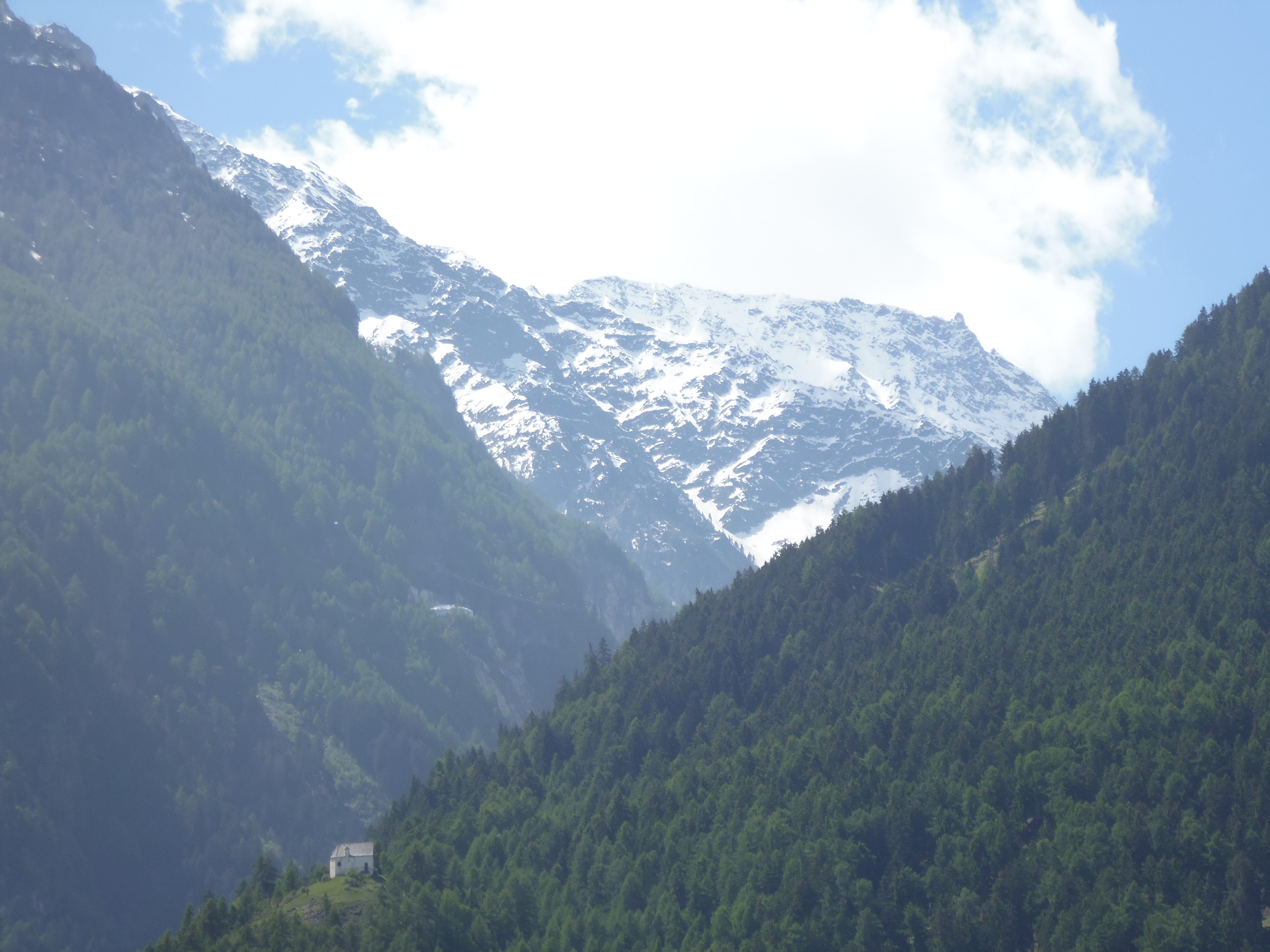 Schluderzahn bei Laas, davor am Eingang des Laaser Tals das Kirchlein St. Martin erkennbar